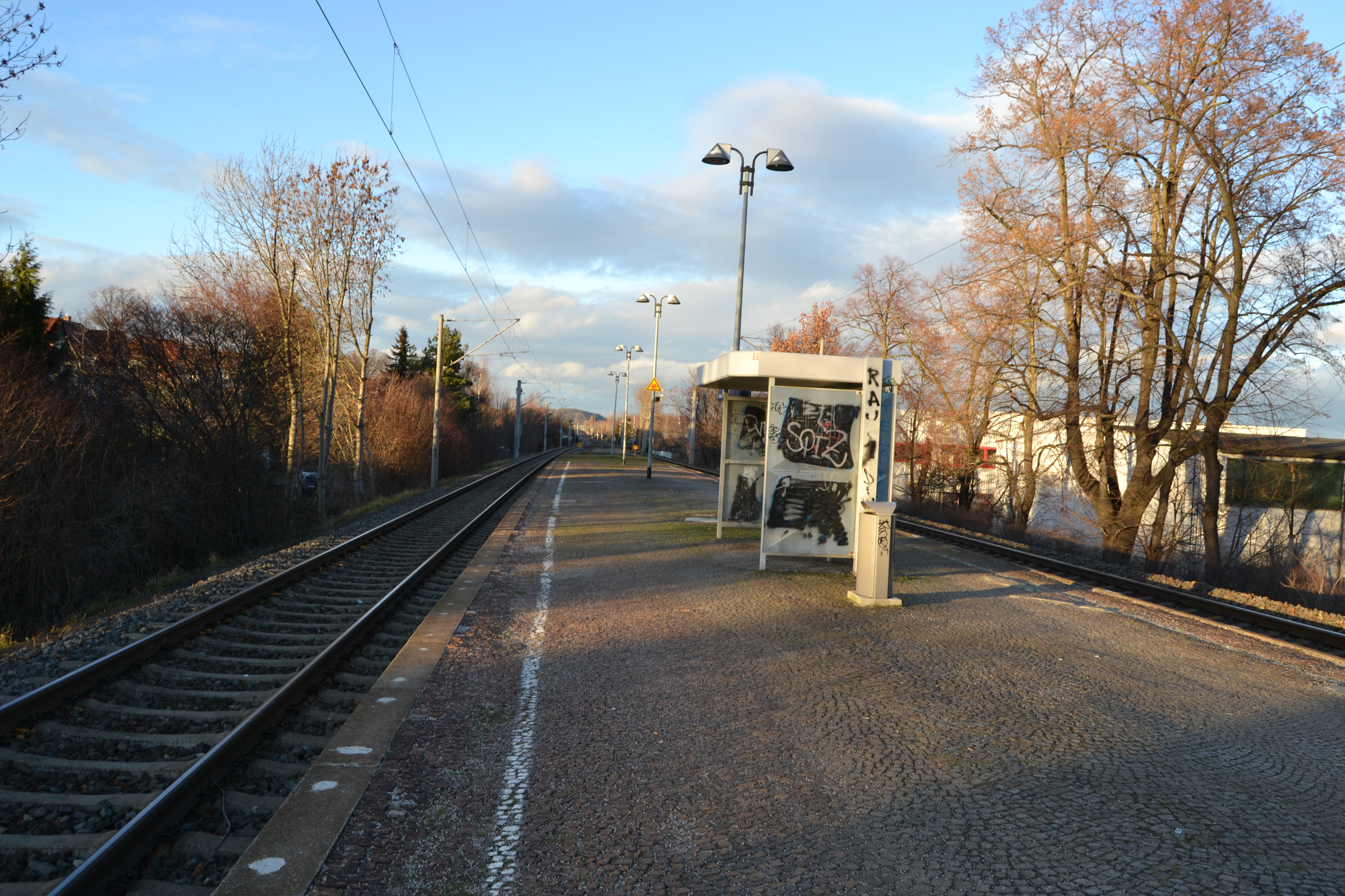 Zwickau-Pölbitz auf der Bahntrasse Dresden-Werdau